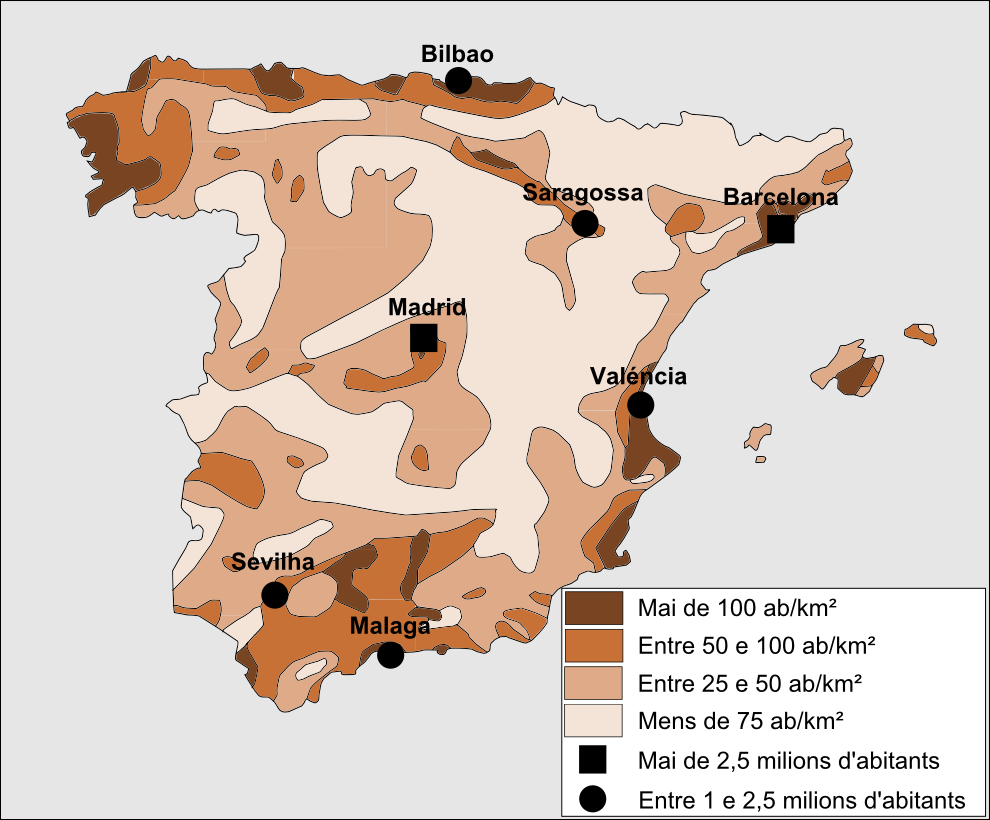 Densitat de populacion e vilas principalas d'Espanha.